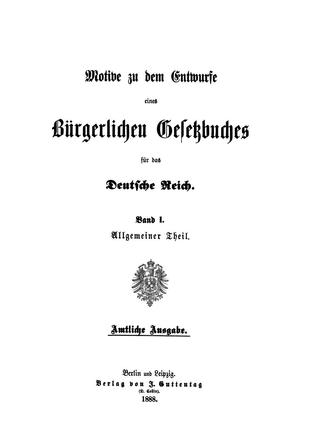 Motive zu dem Entwurfe eines bürgerlichen Gesetzbuches